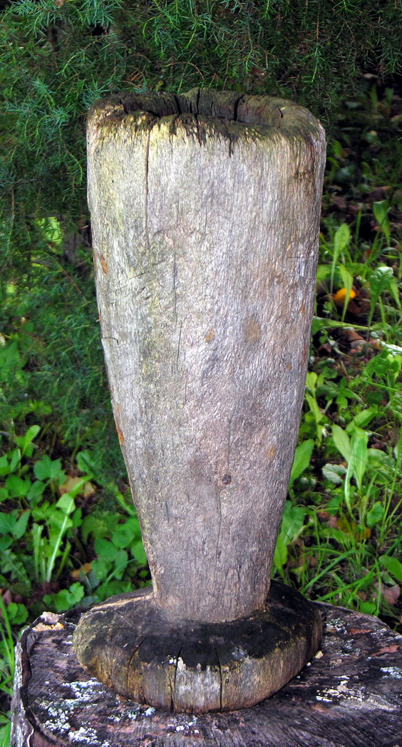 Piesta 2006 m. liepos 31 d.